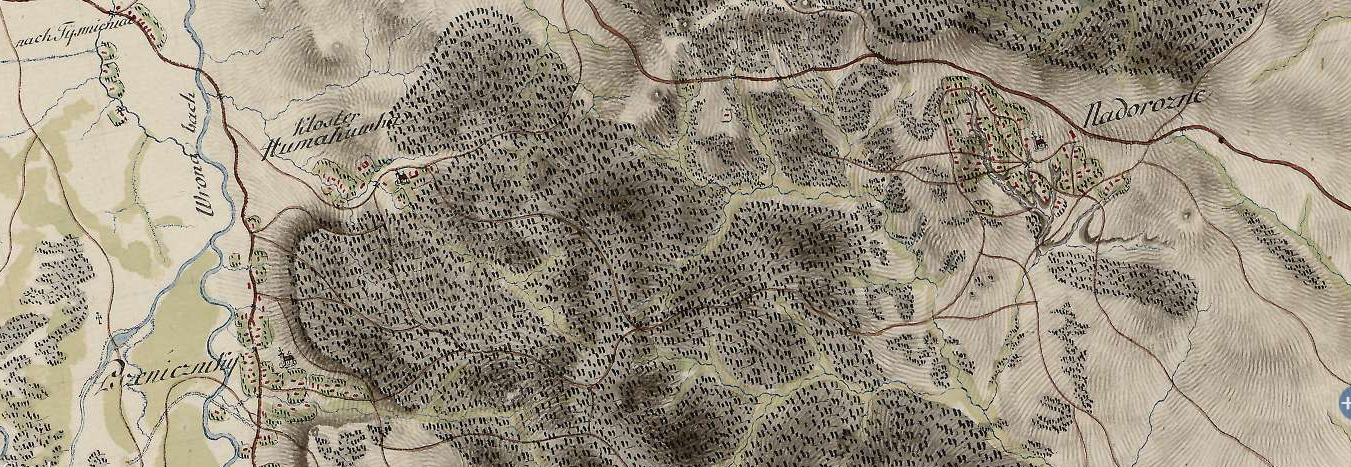 Село Надорожна на австрійських картах 2 половини 18 століття